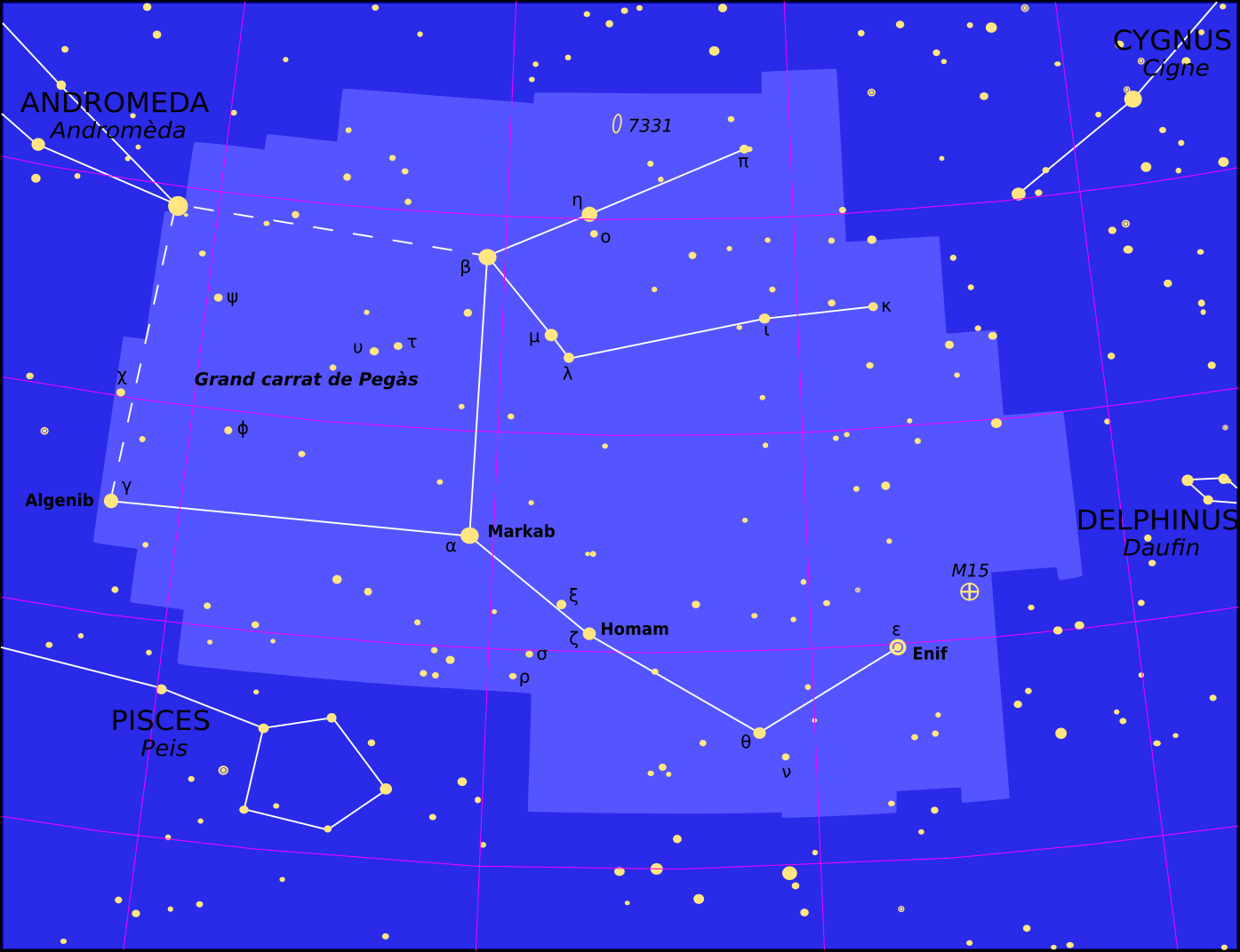 Constellacion de Pegàs.